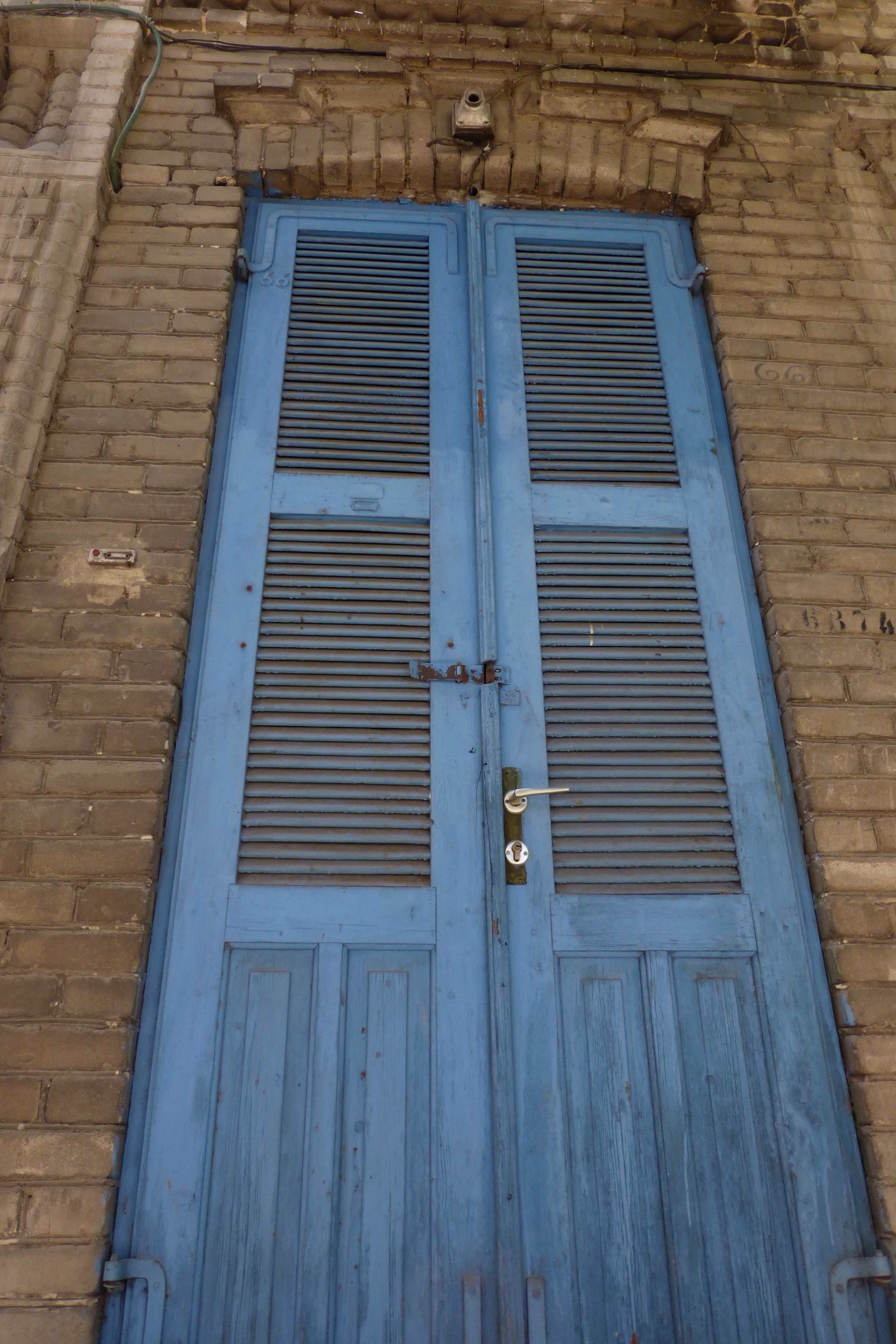 הבית, על חלקה של גודמן, נבנה בדגם בתים דומים בפולין על ידי מרדכי רוטברד ובניו.